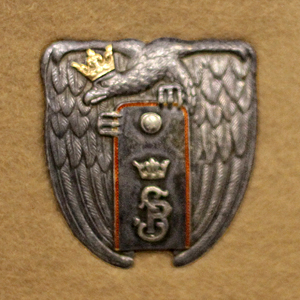 Odznaka Szkoły Podchorążych Piechoty - Ostrów Mazowiecka (instruktorska)